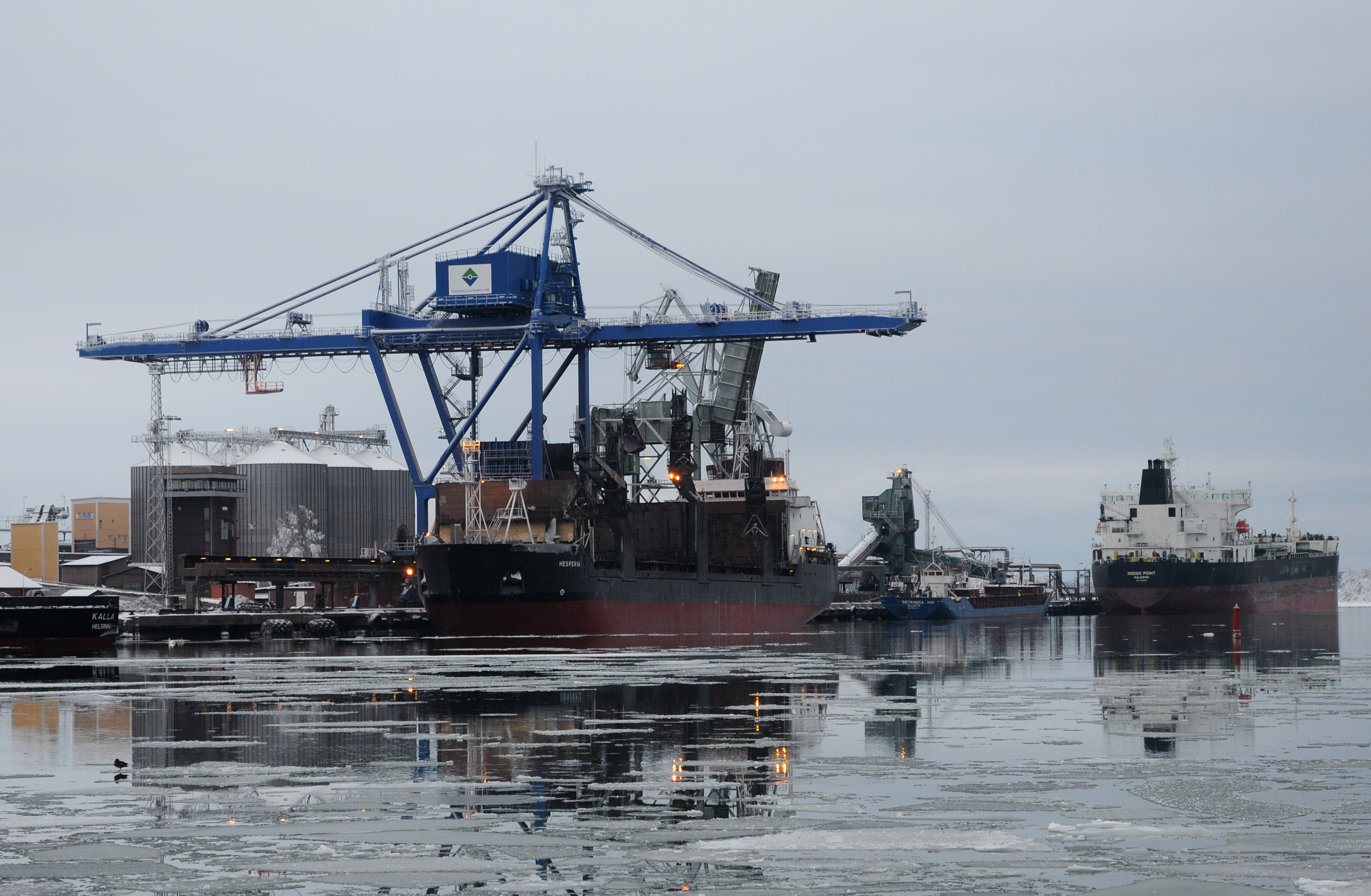 Oxelösunds hamn i januari 2010